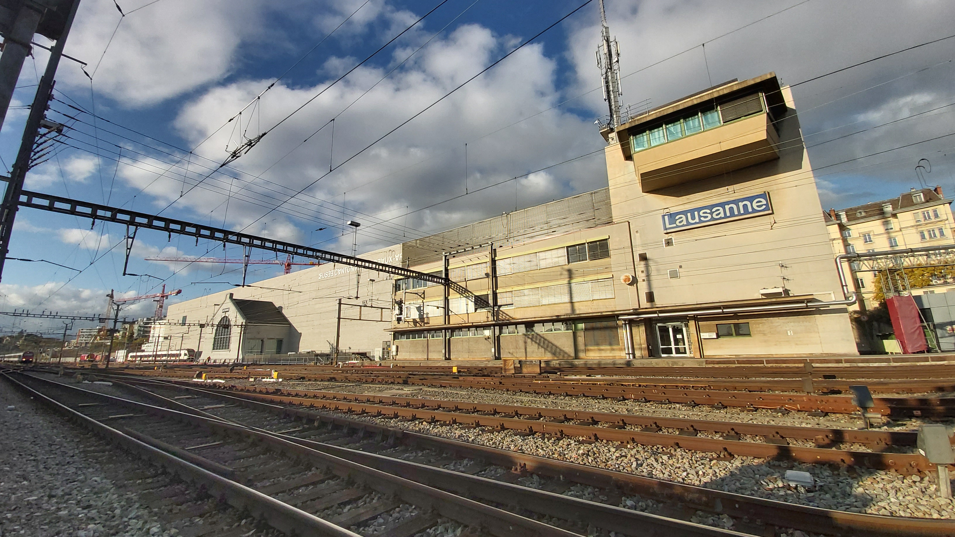 nouveau pôle muséal et vigie de la gare CFF de Lausanne